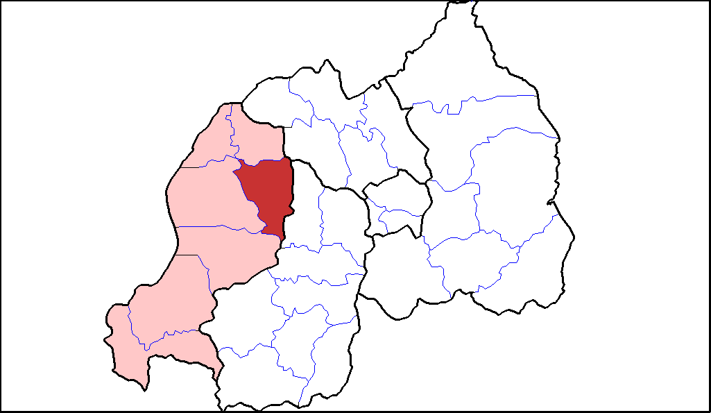 Distretto di Ngororero.